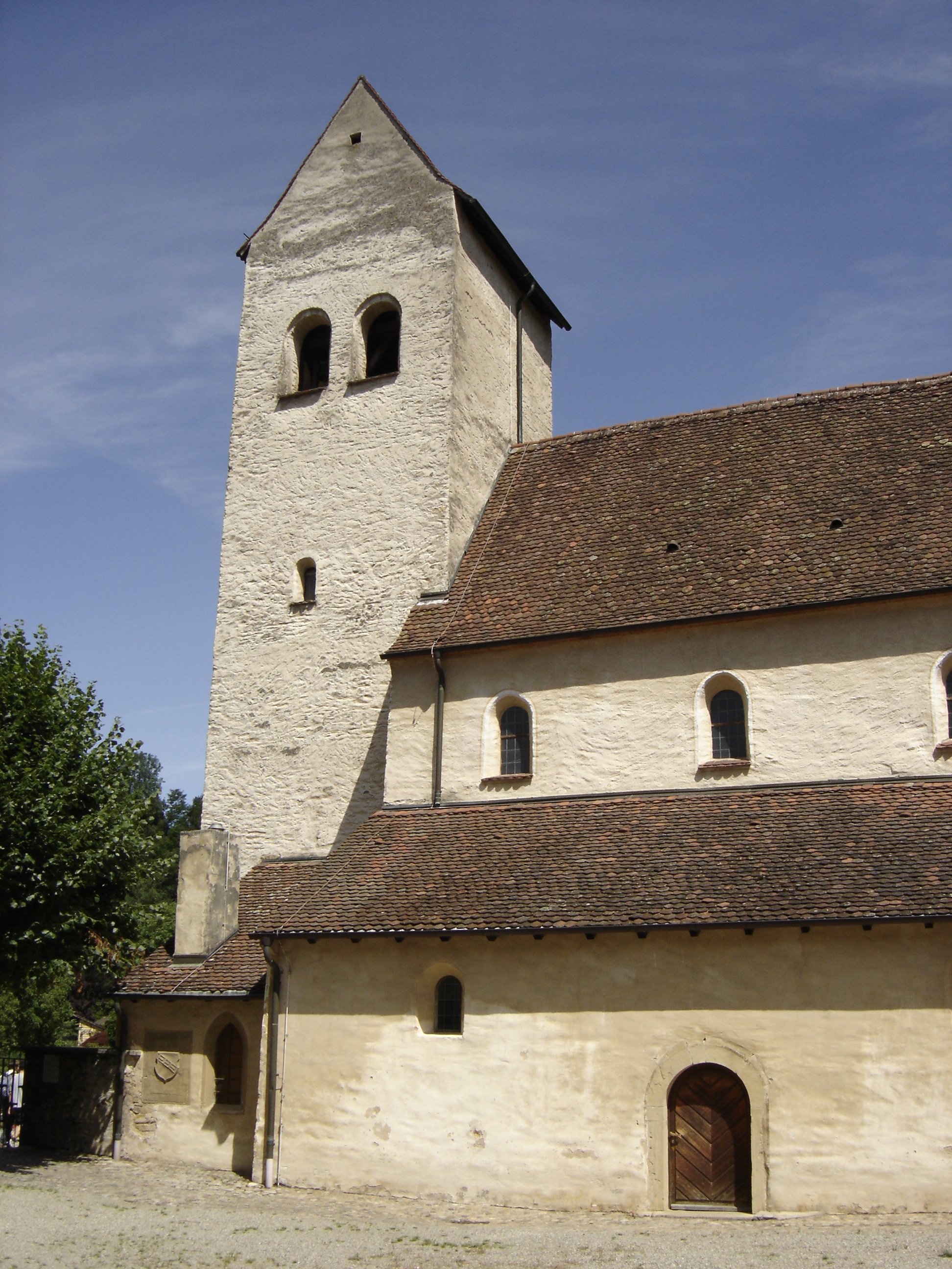 St. Cyriak in Sulzburg